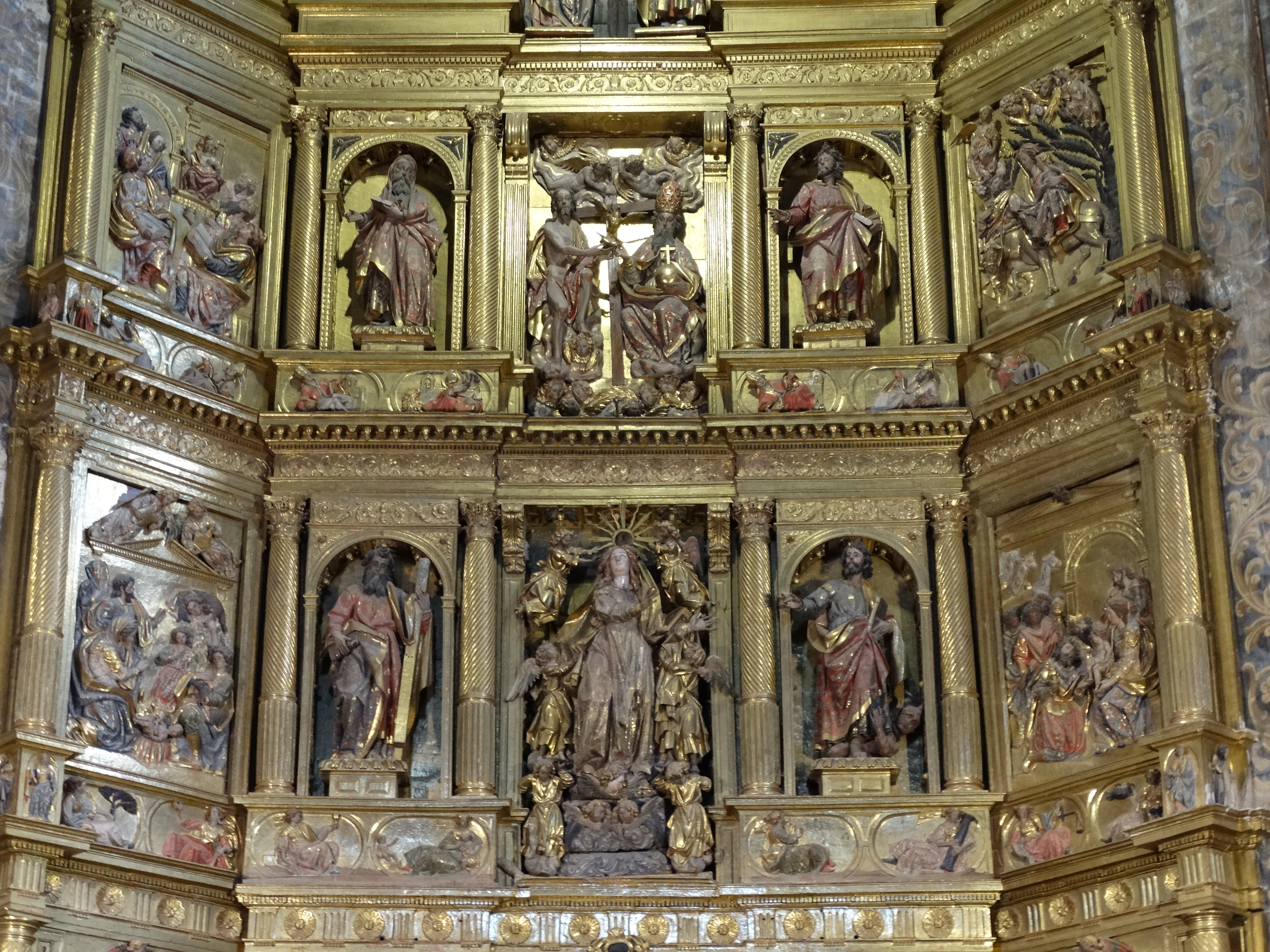 Iglesia de Nuestra Señora de la Asunción en Briones, La Rioja (España). Retablo mayor clasicista de 1626 según las trazas de Hernando de Murillas padre. Lo terminó en 1650 su hijo Hernando de Murillas y Vélez de Loyola.